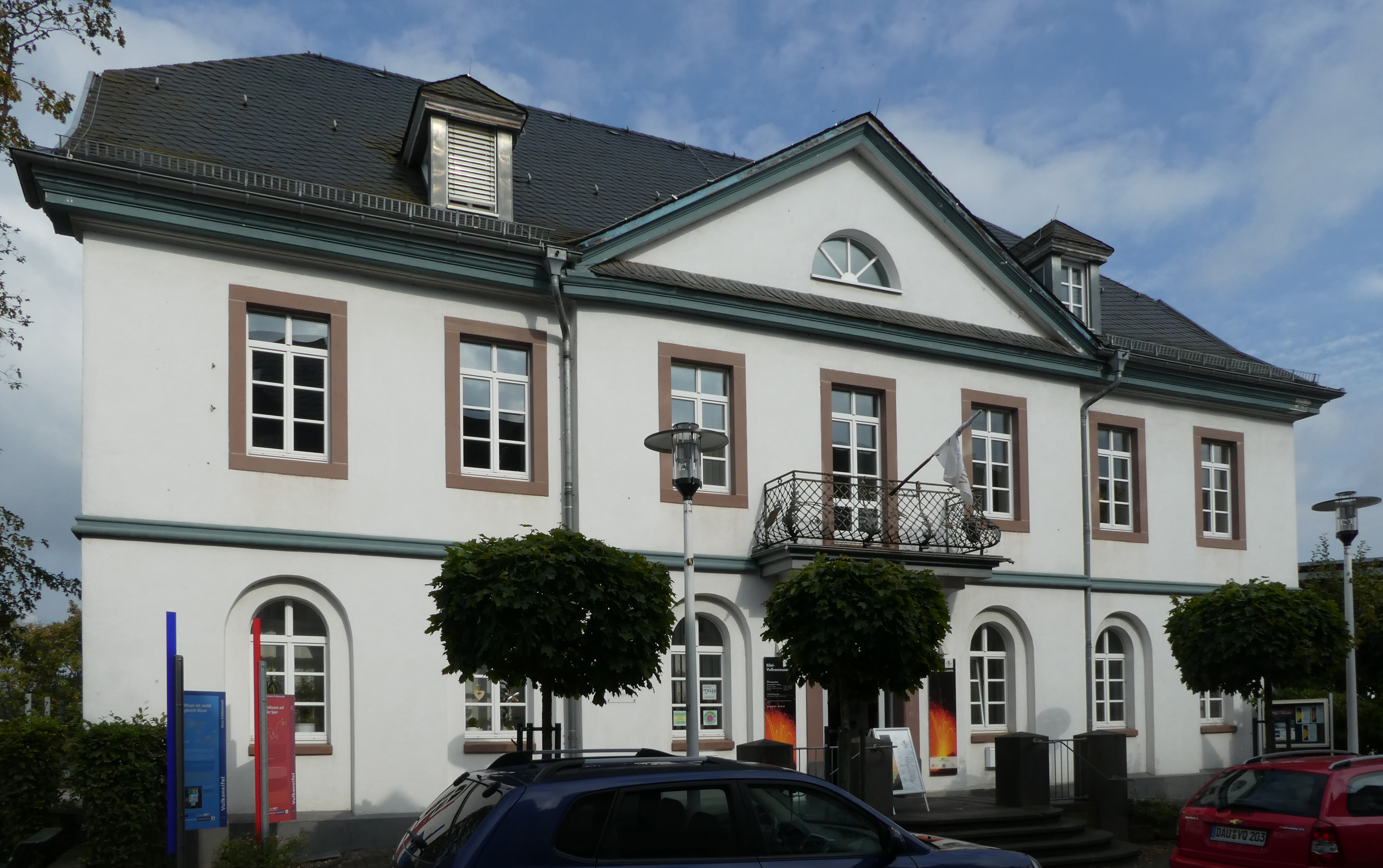 Ehemaliges Landratsamt in der Leopoldstraße 9 in Daun. Heute befindet sich darin das Eifel-Vulkanmuseum.